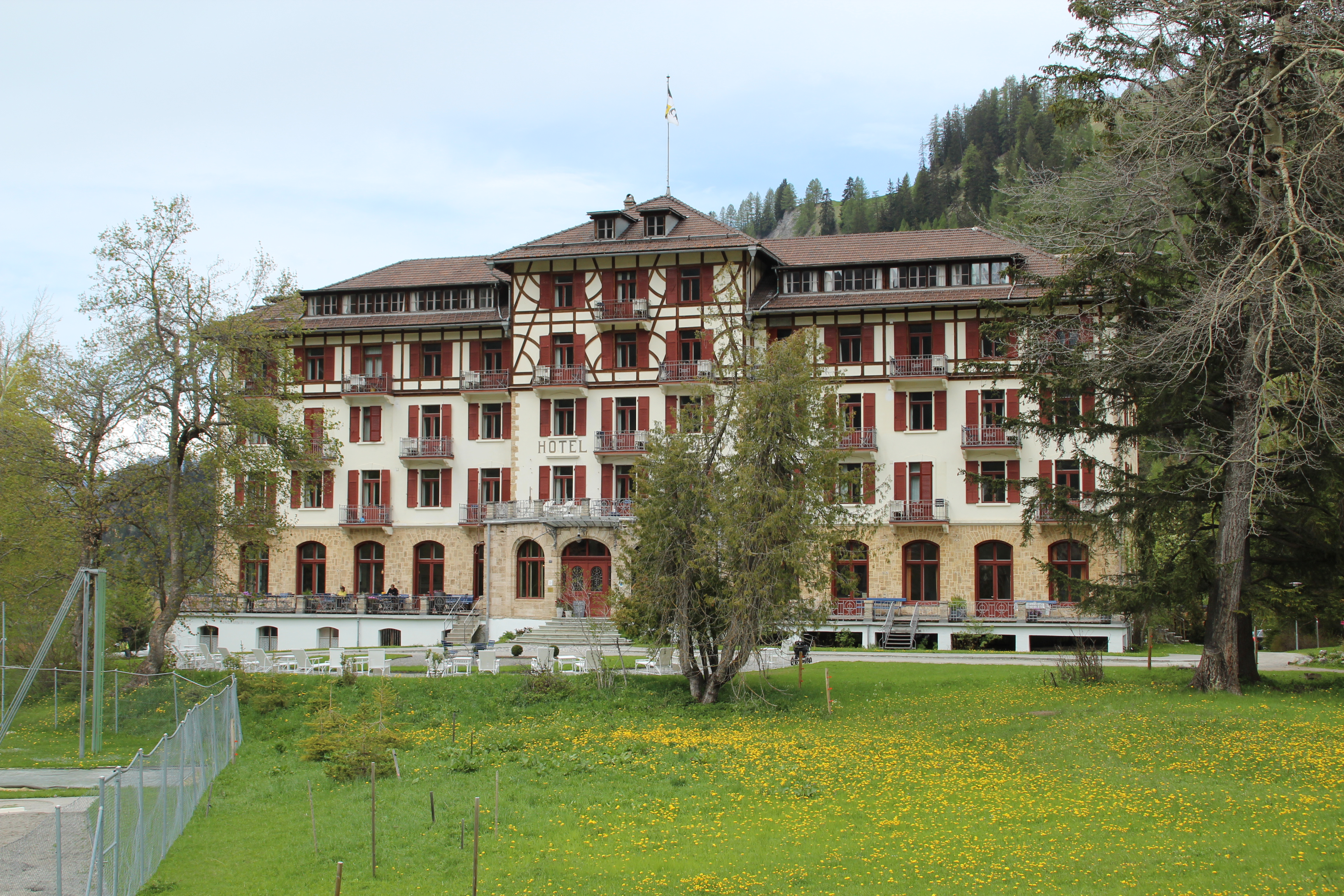 Kurhaus Bergün Südseite